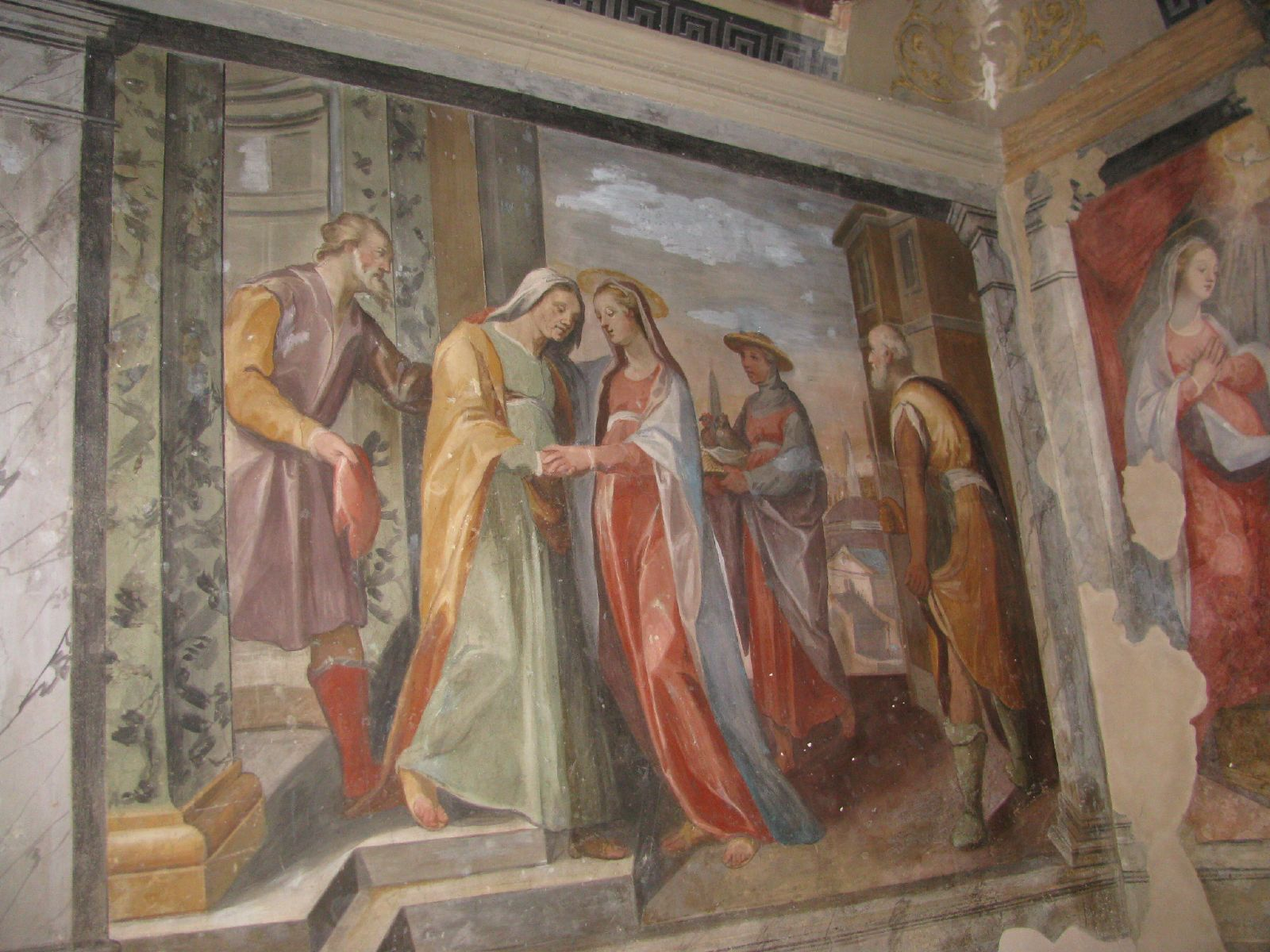 Urbania - Oratorio del Carmine-Giorgio Picchi-Pitture a fresco